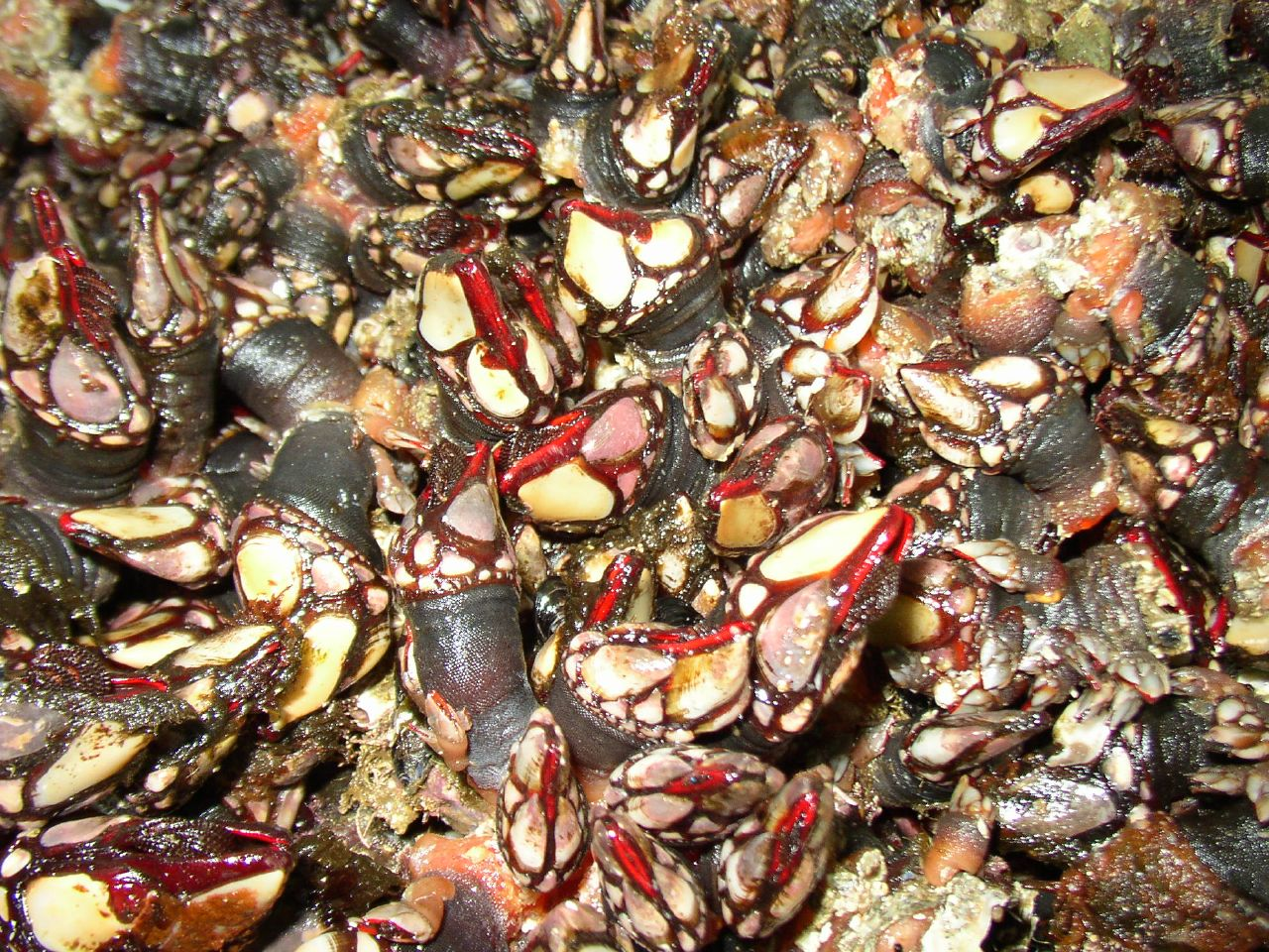 Percebe galego (Pollicipes cornucopiae)